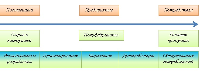 Слайд. Цепочка ценности